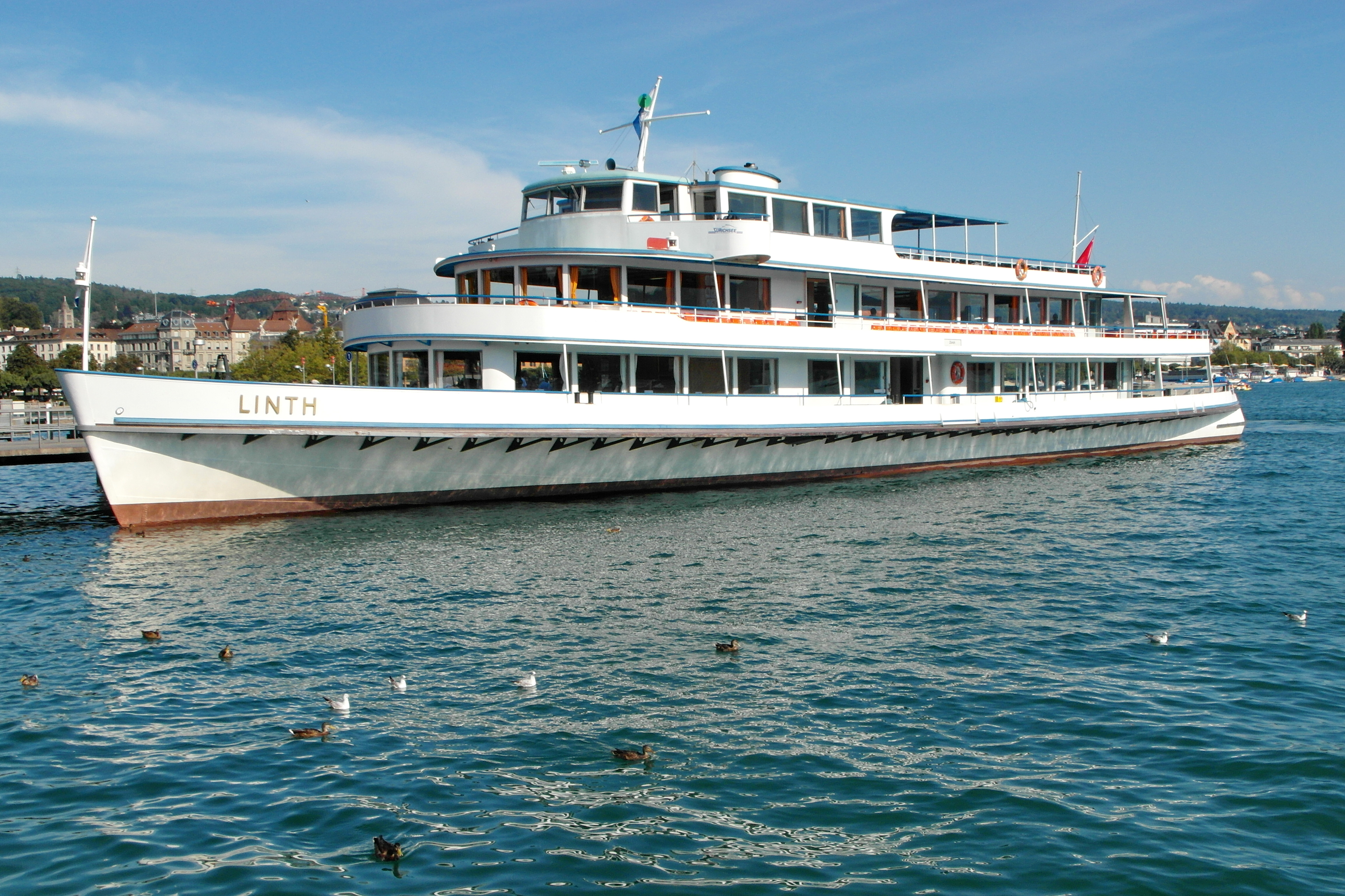 Zürichsee-Schiffahrtsgesellschaft (ZSG) MS Linth on Zürichsee at Bürkliplatz in Zürich (Switzerland)